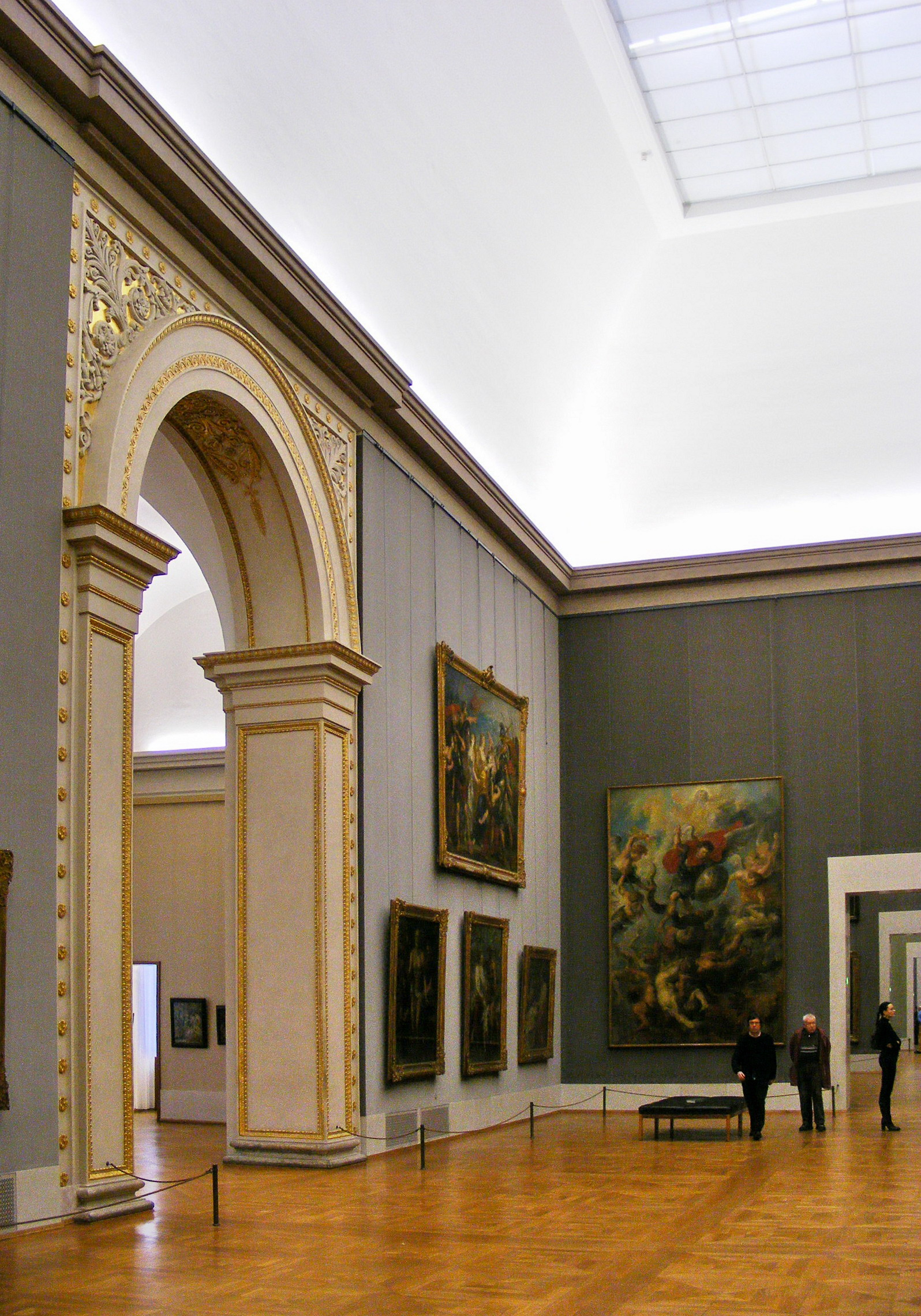 Alte Pinakothek − Saal IX mit Blick auf Saal VIII (2008)